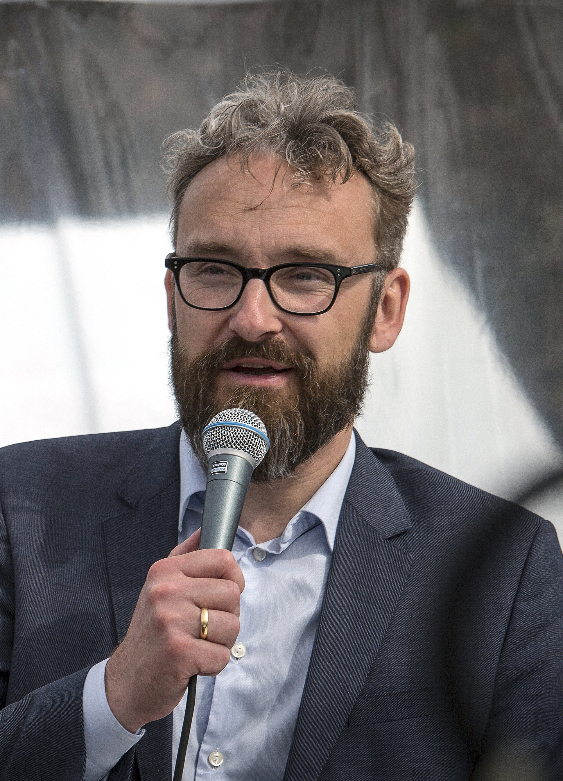 Region Skånes regionstyrelses ordförande Henrik Fritzon (S) till vänster och Danmarks transportminister Ole Birk Olesen (LA) debatterar torsdagen den 15 juni 2017 HH-förbindelsen i Greater Copenhagens tält på Folkemødet i Allinge på Bornholm. De är överens om att att det behövs en fast förbindelse mellan Helsingborg och Helsingör men medan Ole Birk Olesen bara vill ha en biltunnel vill Henrik Fritzon ha både en bil-och en tågtunnel...Photo: News Øresund - Sofie Paisley.© News Øresund - Sofie Paisley (CC BY 3.0).. .Detta verk av News Øresund är licensierat under en Creative Commons Erkännande 3.0 Unported-licens (CC BY 3.0). Bilden får fritt publiceras under förutsättning att källa anges. .The picture can be used freely under the prerequisite that the source is given. News Øresund, Malmö, Sweden.News Øresund är en oberoende regional nyhetsbyrå som är en del av det oberoende dansk-svenska kunskapscentrat Øresundsinstituttet...